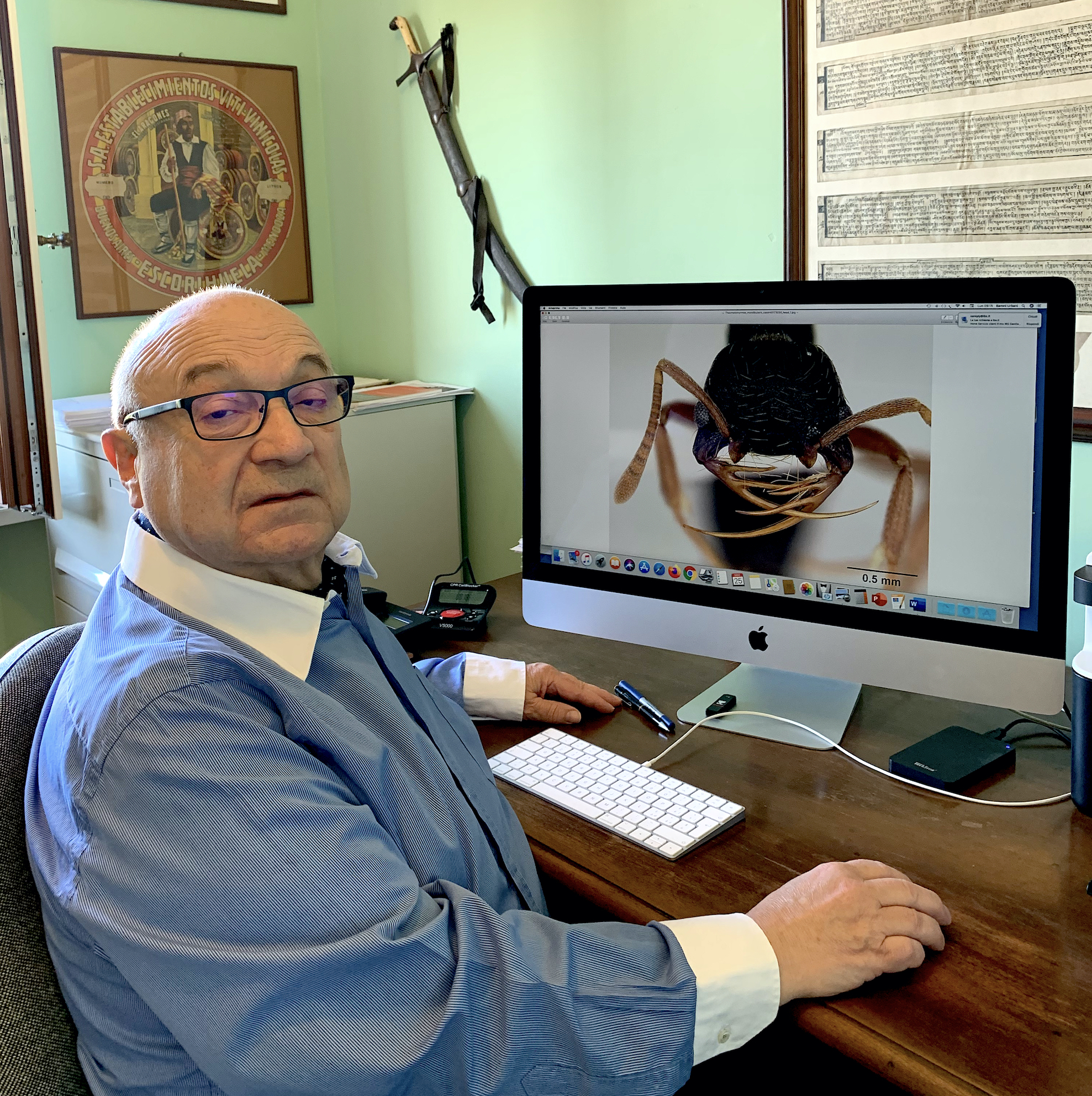 Cesare Baroni Urbani al lavoro nellsa sua casa di Sirolo